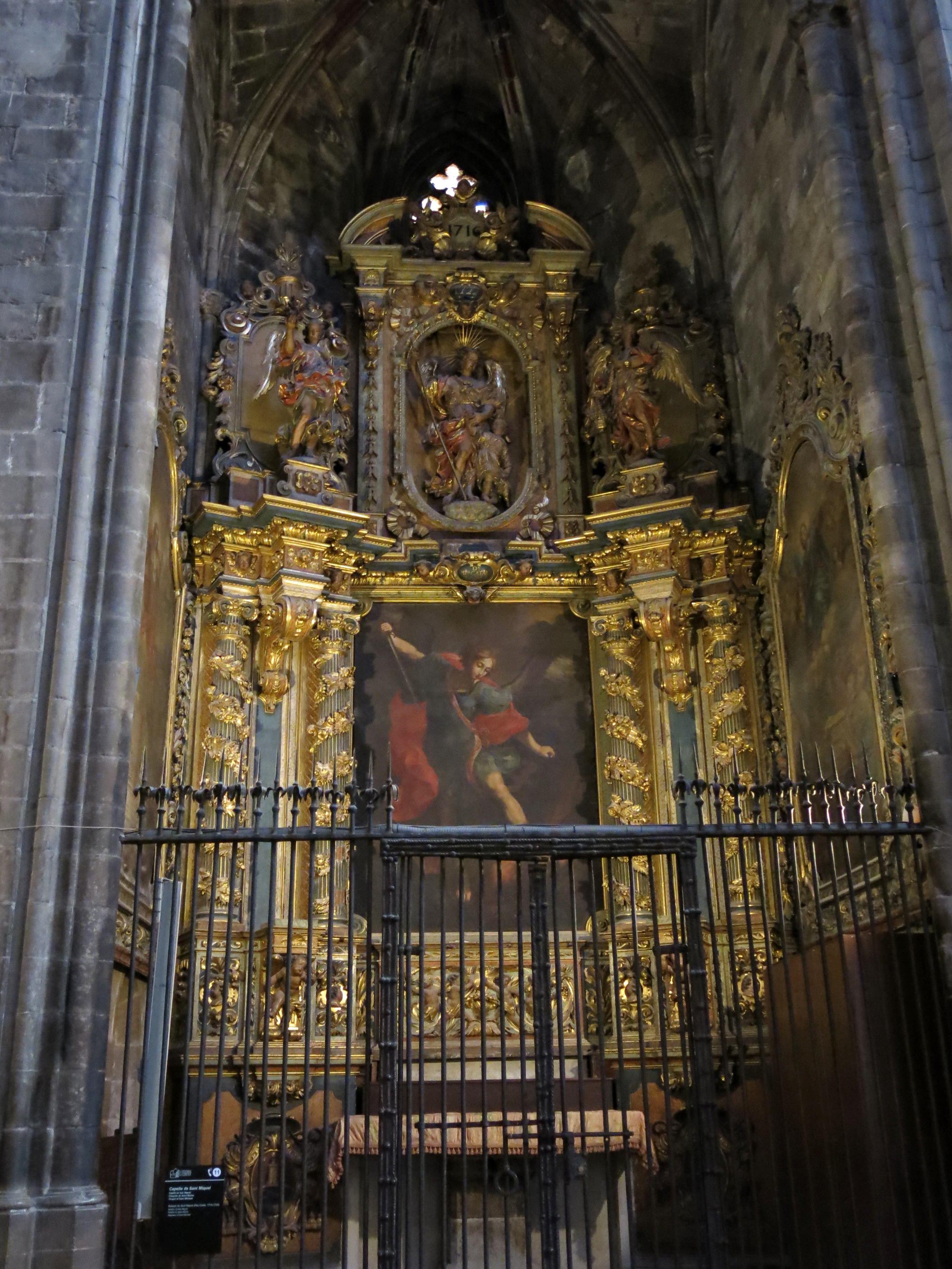 Catedral de Santa Maria (Girona)